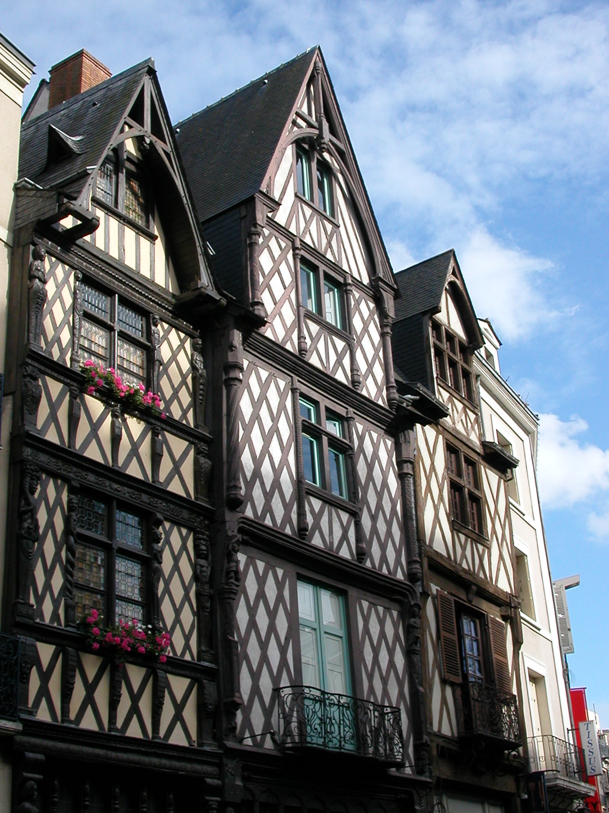 Maisons à colombage à Angers, rue de l'Oisellerie.